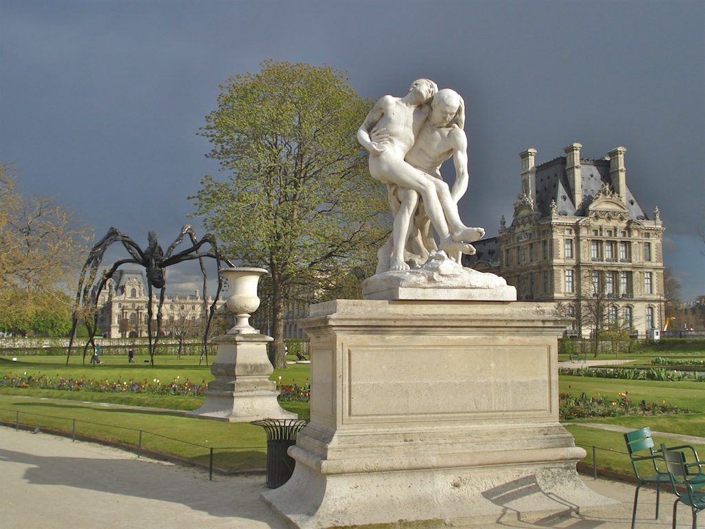 Le Bon Samaritain, sculpture de François-Léon Sicard. Marbre 1896. Exposé dans le jardin des Tuileries à Paris